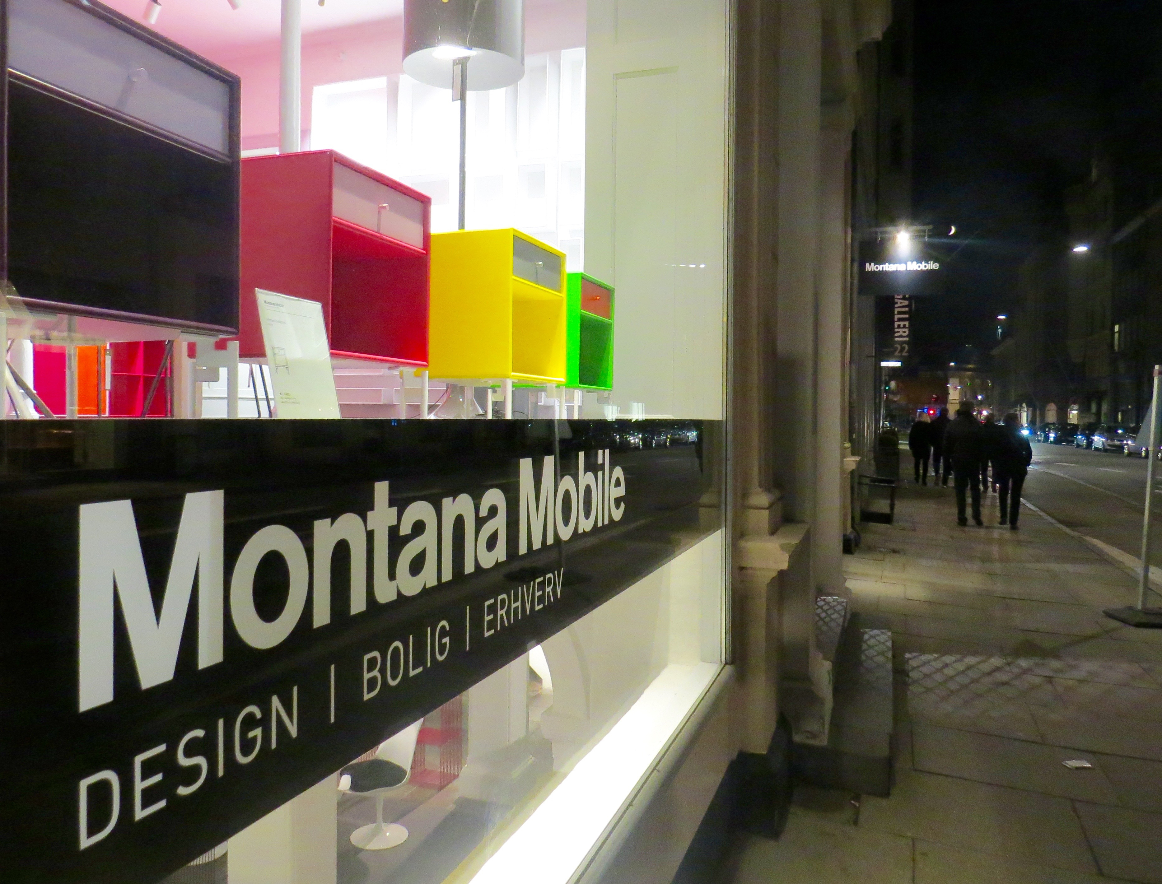 Butikken Montana Mobile i Bredgade, København